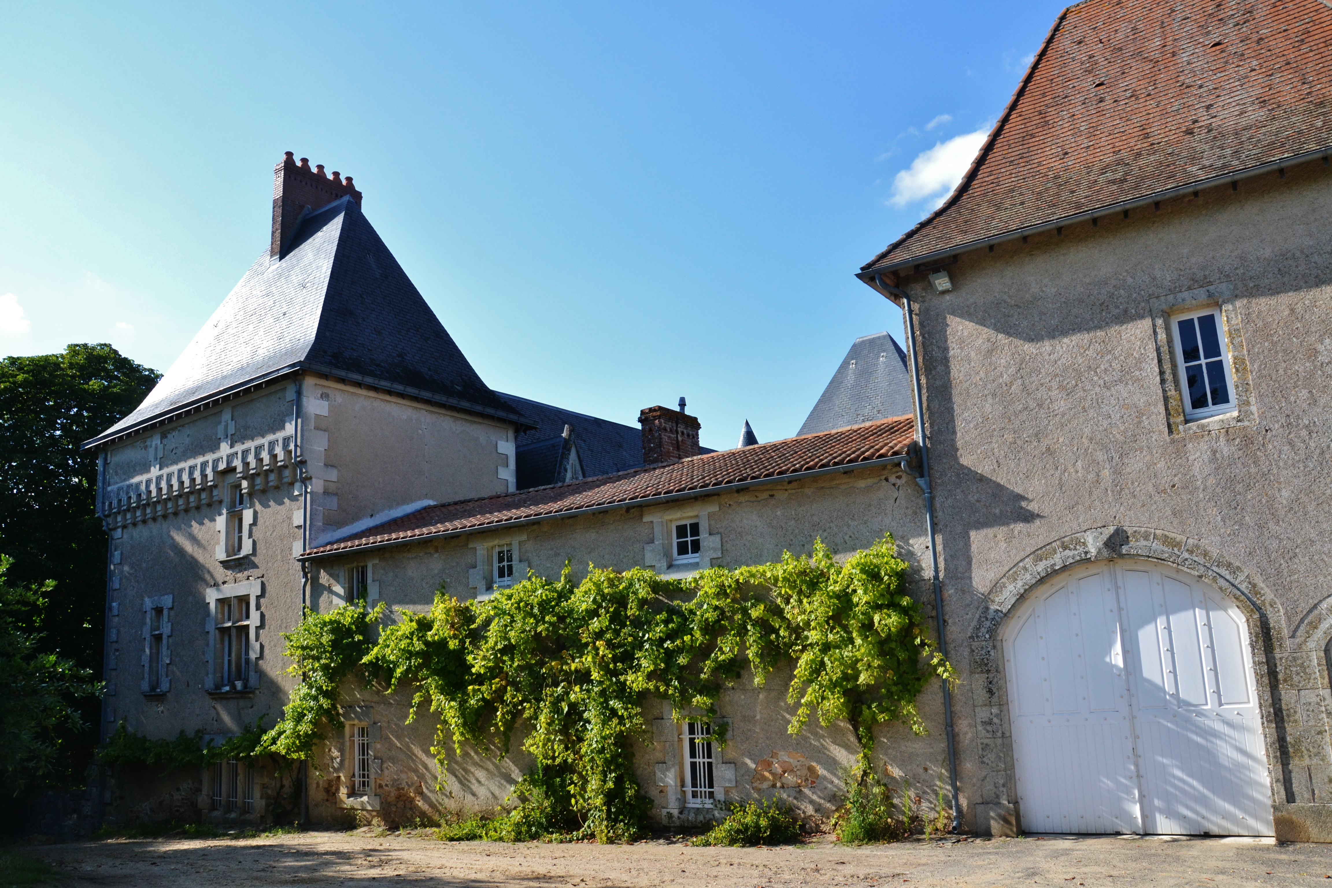 Le château des Dauges, près de Chassenon (Charente, France)